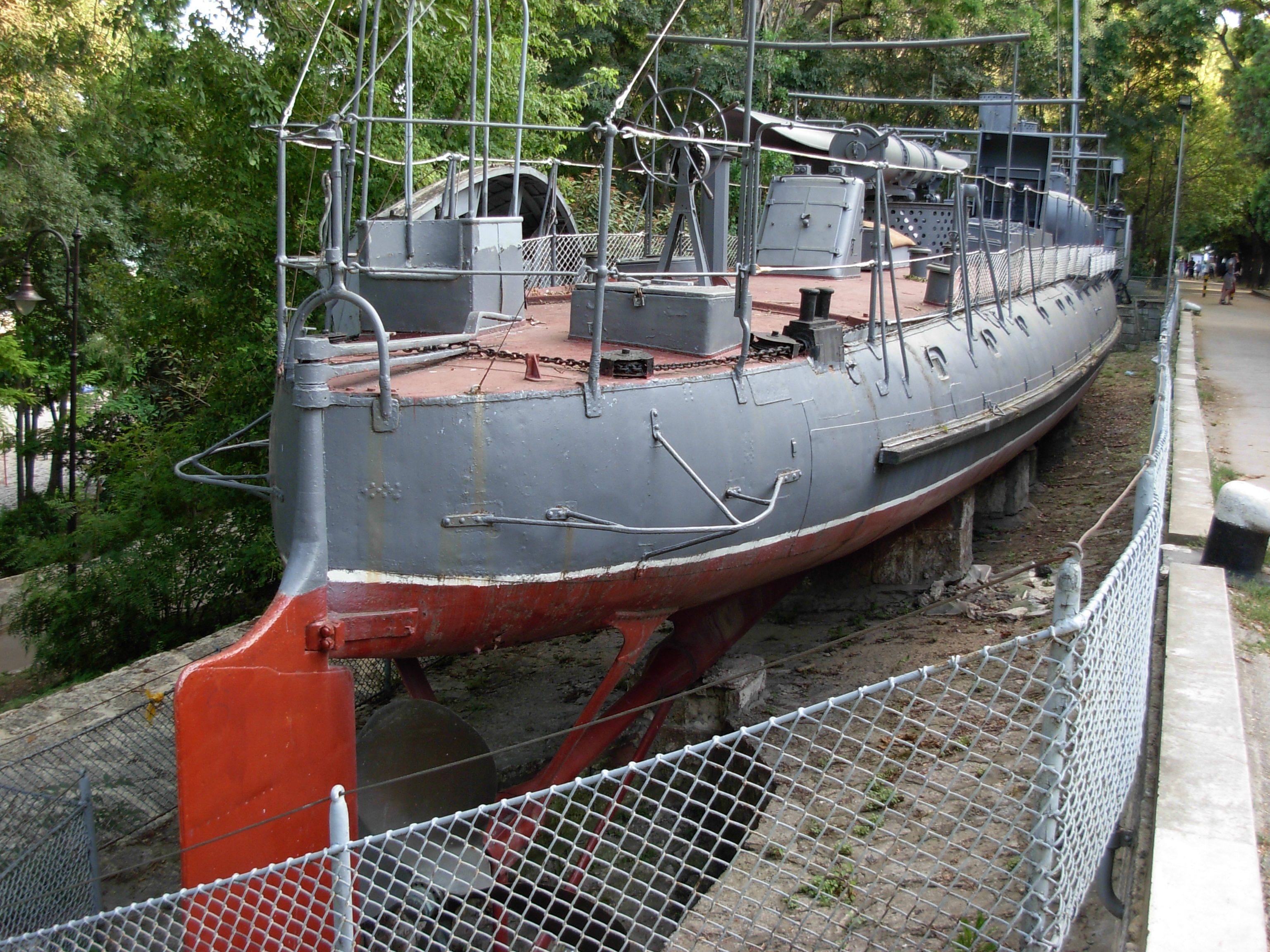 Varna, Bulgaria